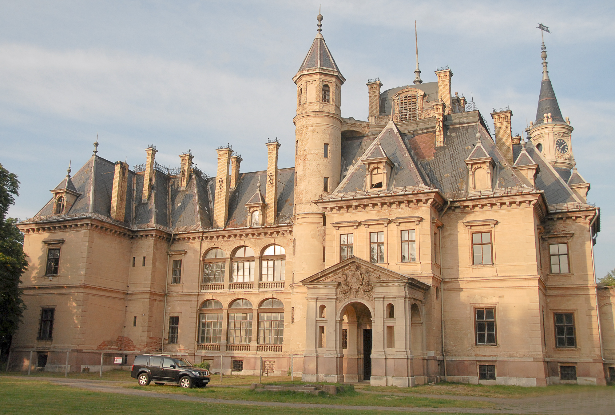 Das Schlossberger Schloss in der Frontsicht im Sommer 2016.